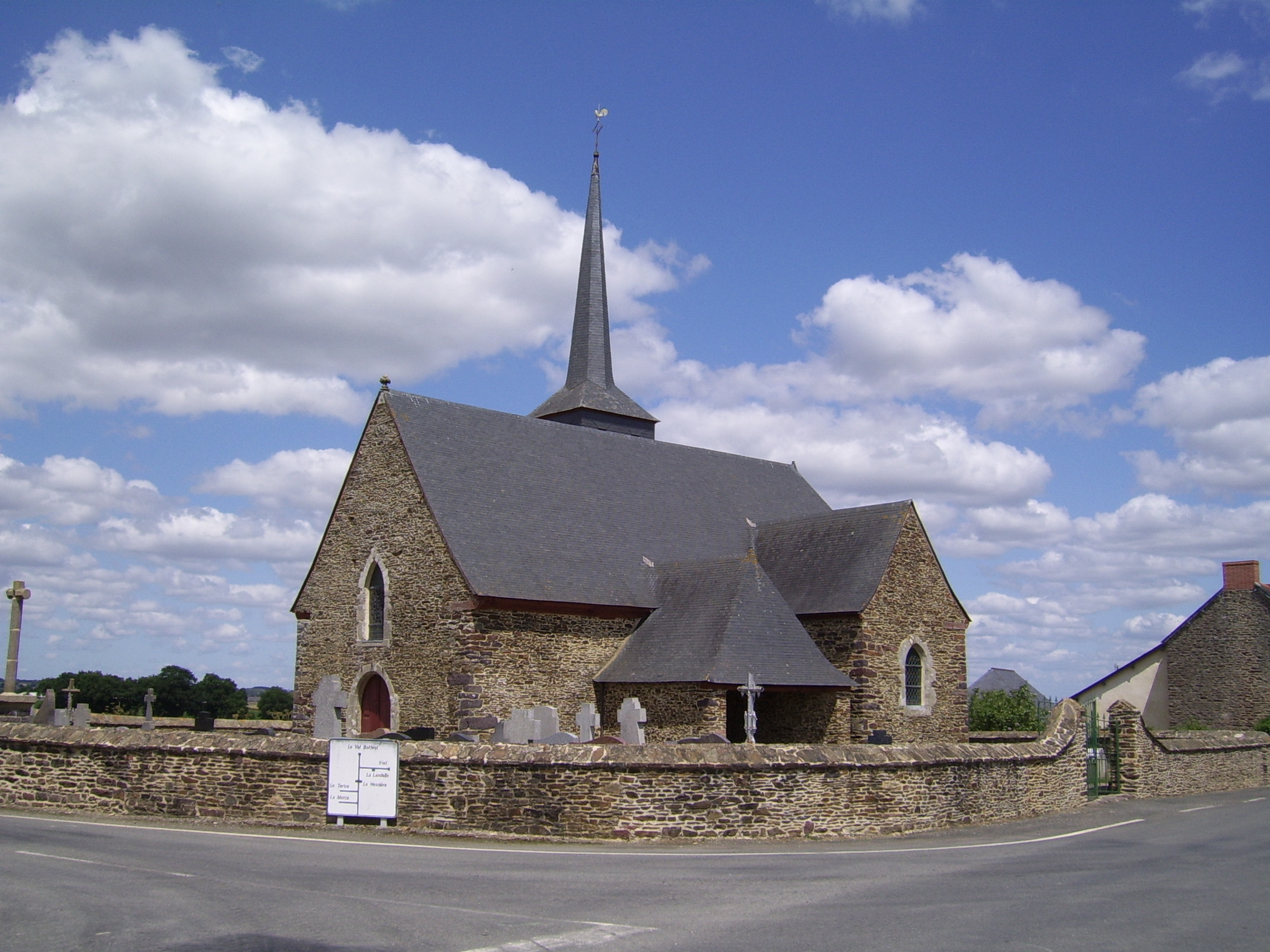 Façade de l'église Saint Armel, située dans la commune de Bléruais (France, 35)